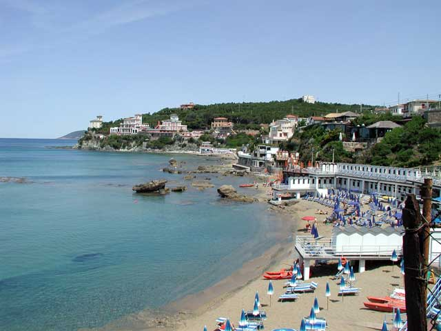 Golfo del Quercetano, Castiglioncello, Rosignano Marittimo (LI), Italy